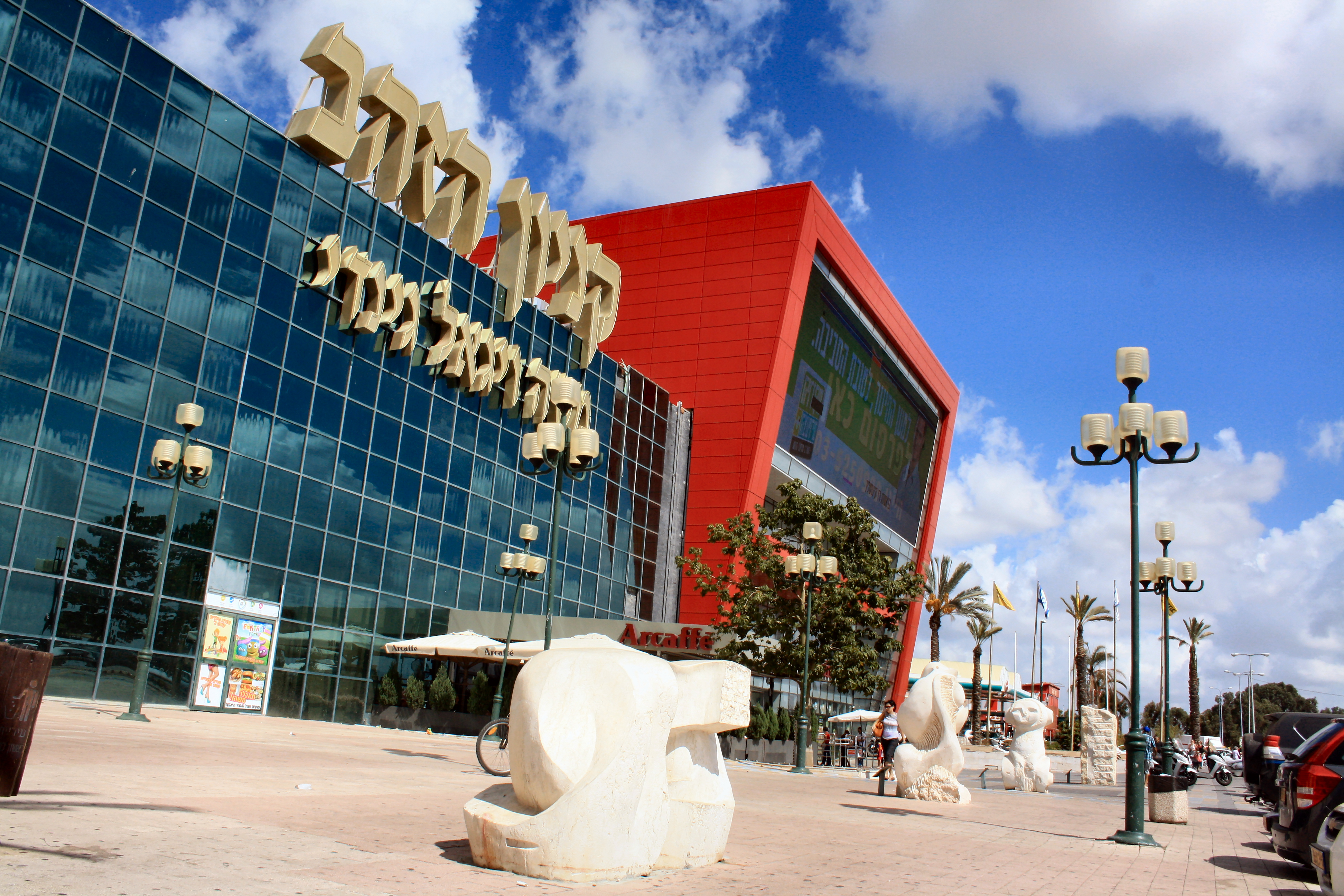 האגף החדש של קניון הזהב, ראשון לציון.